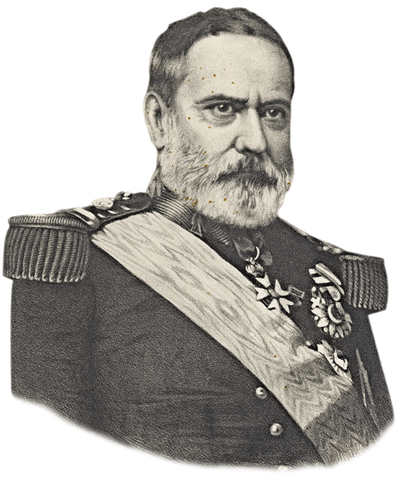 Filipe Folque. Retrato meio tronco